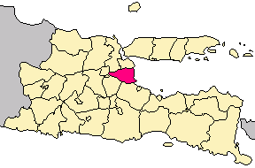 Kabupaten Sidoarjo in East Java province, Indonesia